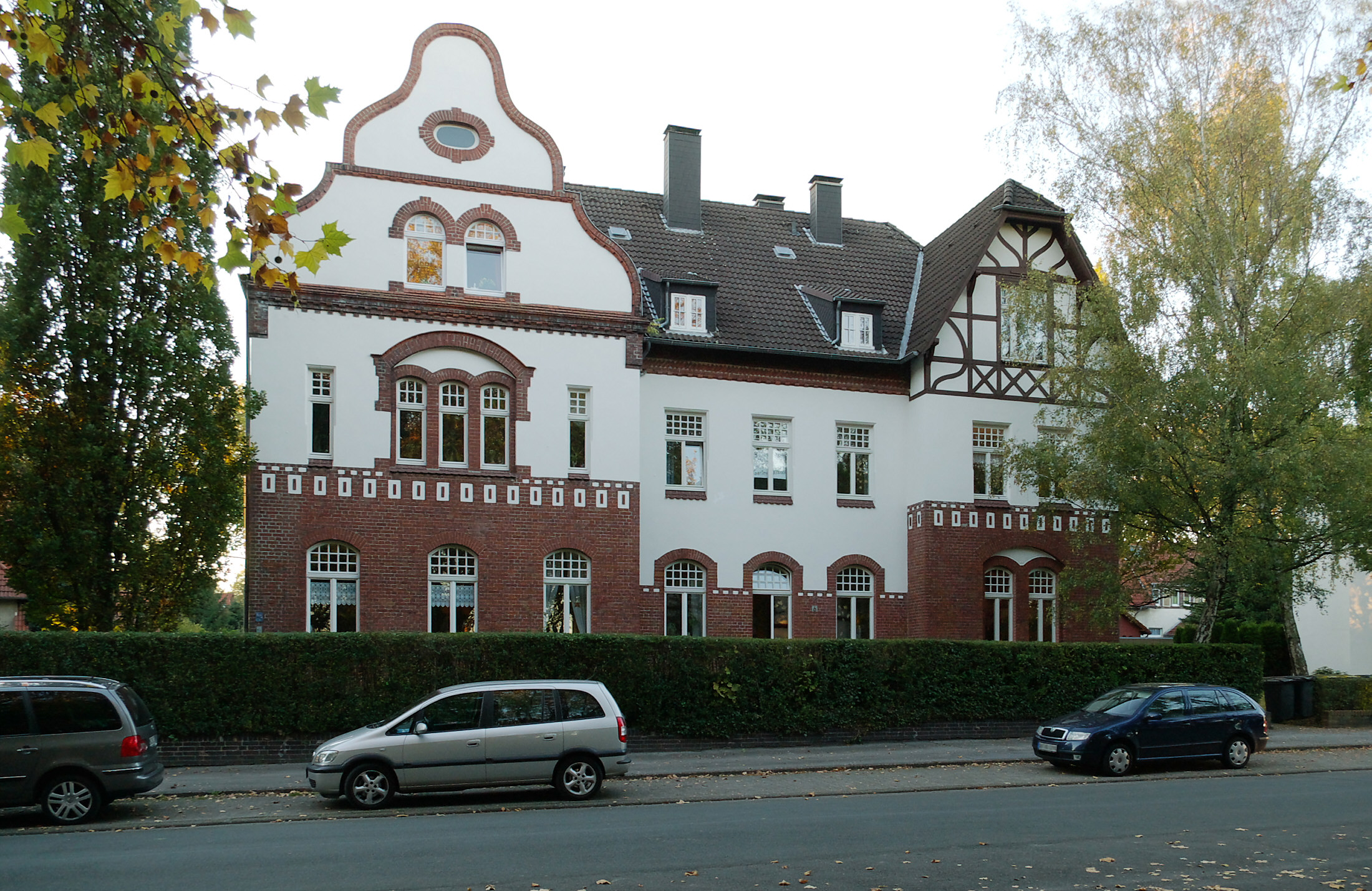 Kolonie Landwehr, Dortmund, Rahderweg 6, 44388 Dortmund